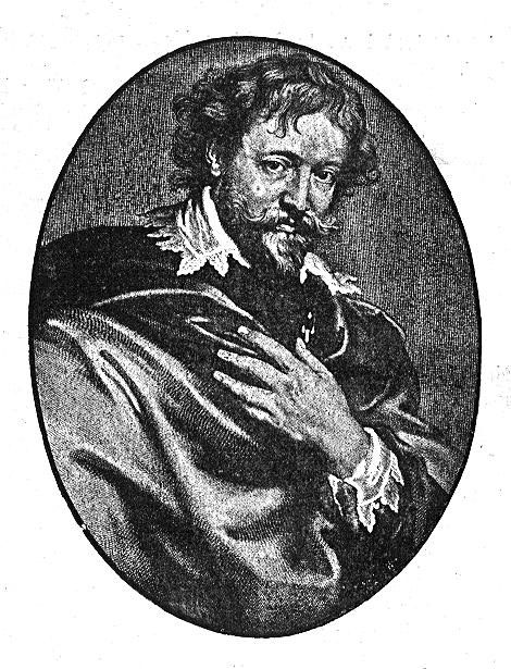 Peter Paul Rubens